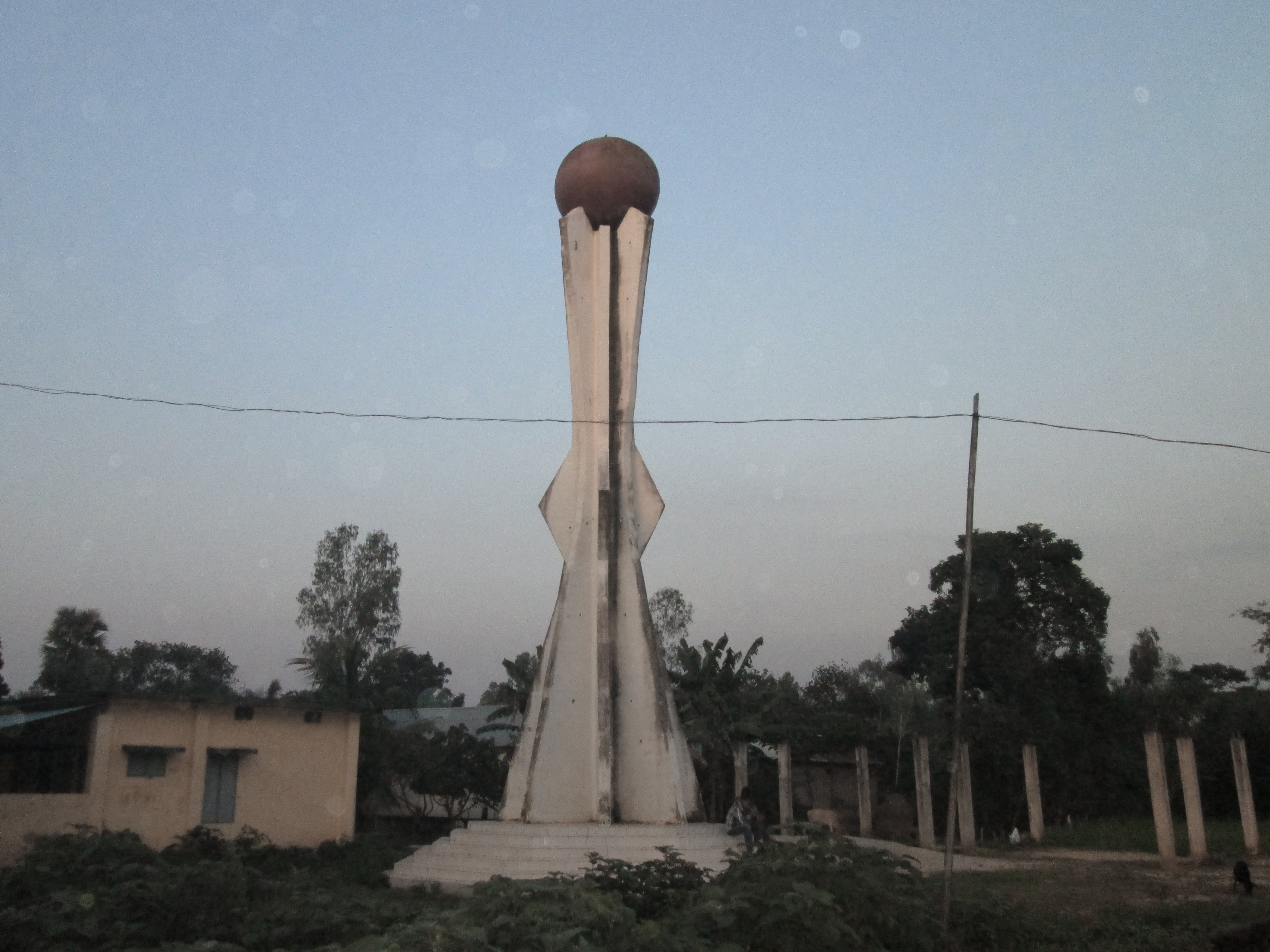 Bohola monument in Dinajpur